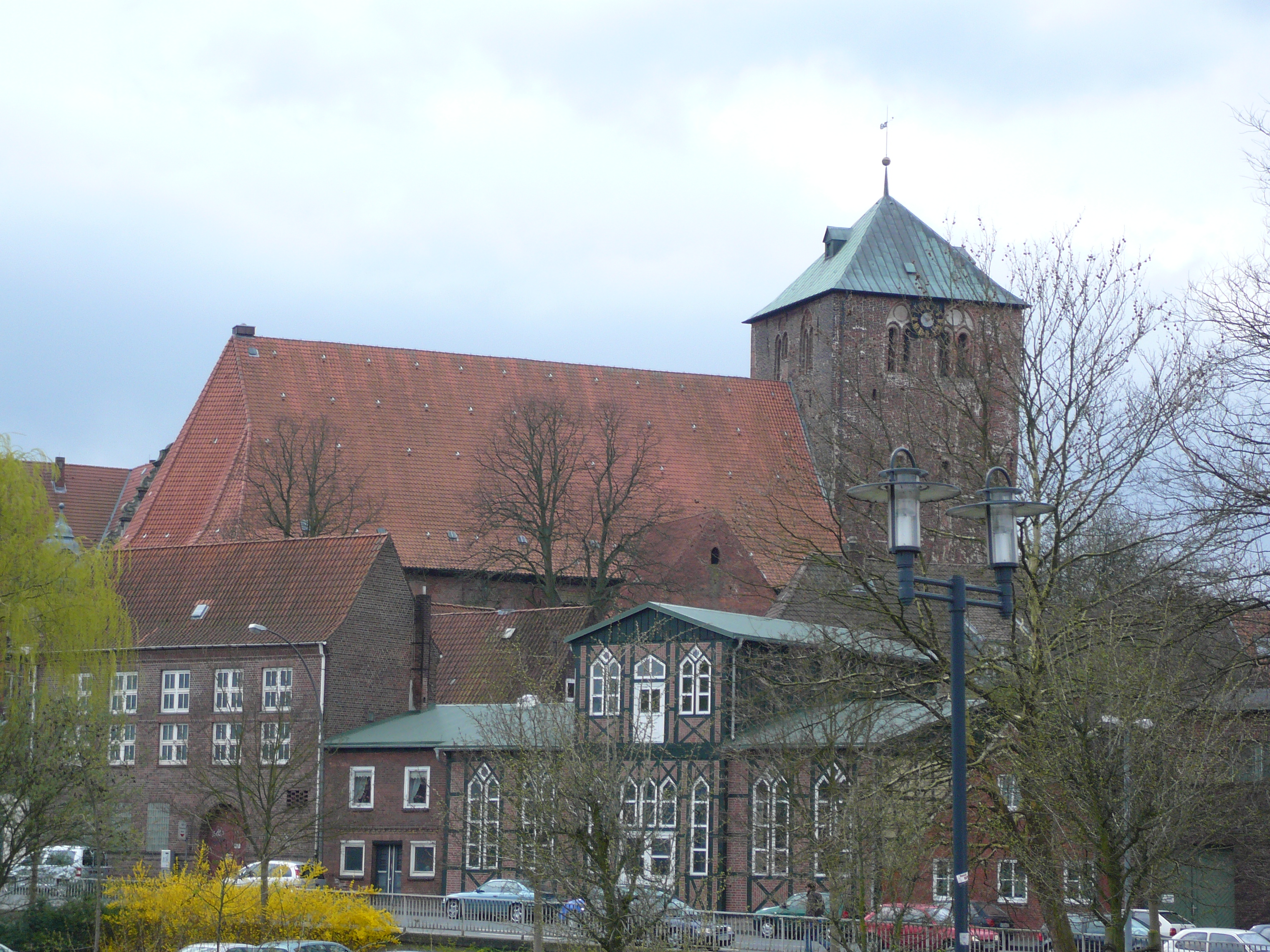 St. Wilhadi Kirche in Stade, vorn der Fachwerkbau der alten Turnhalle.